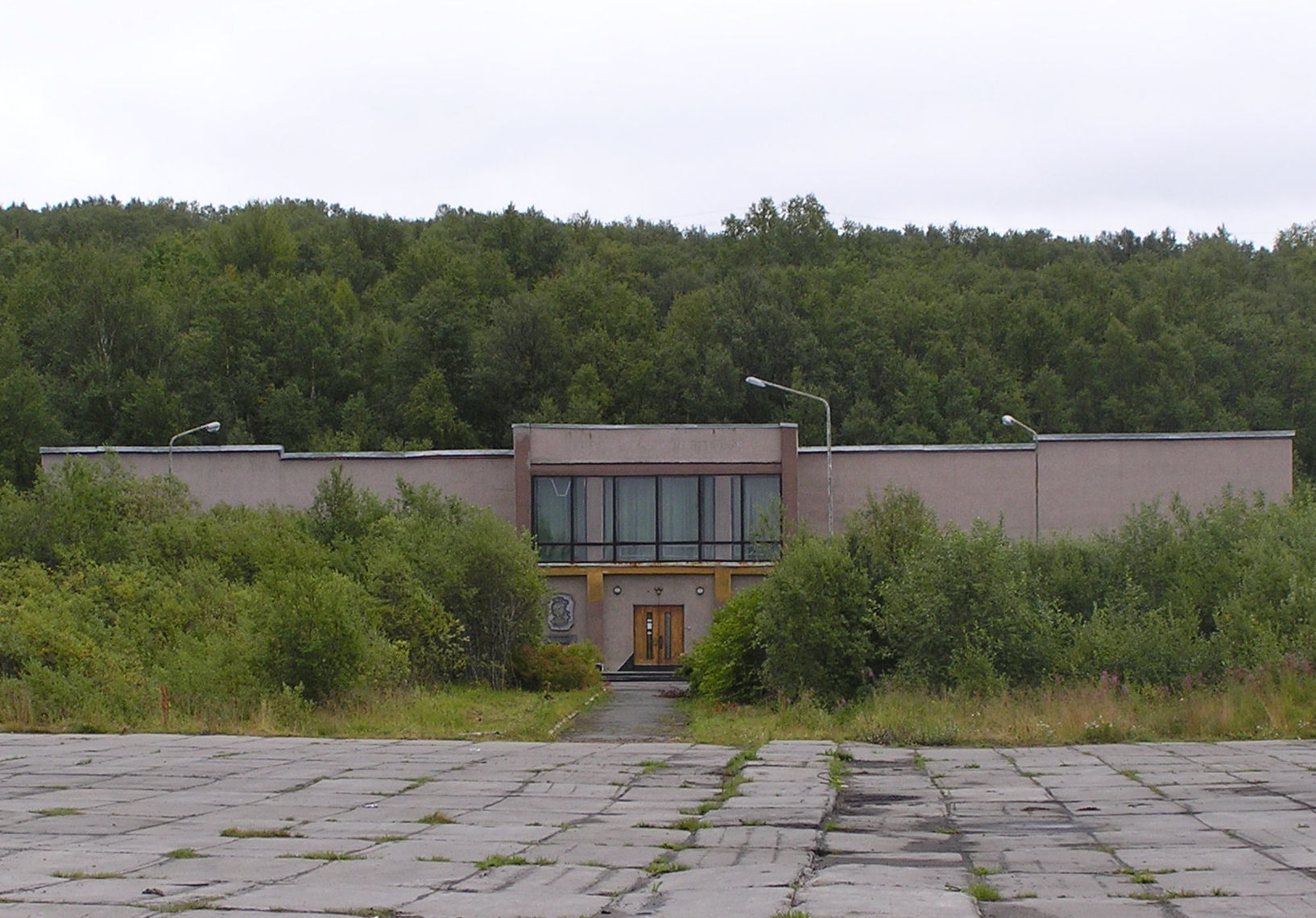 Музей военно-воздушных сил Северного флота. Основное здание.